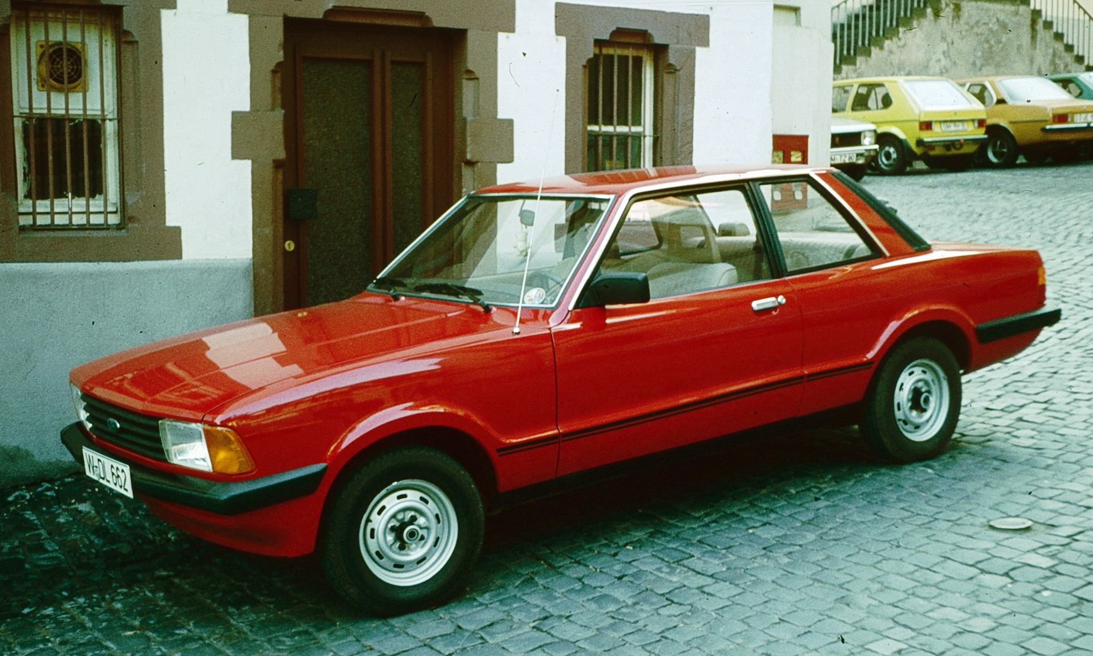 Ford Taunus 2 door (aus ?Wuerzburg)